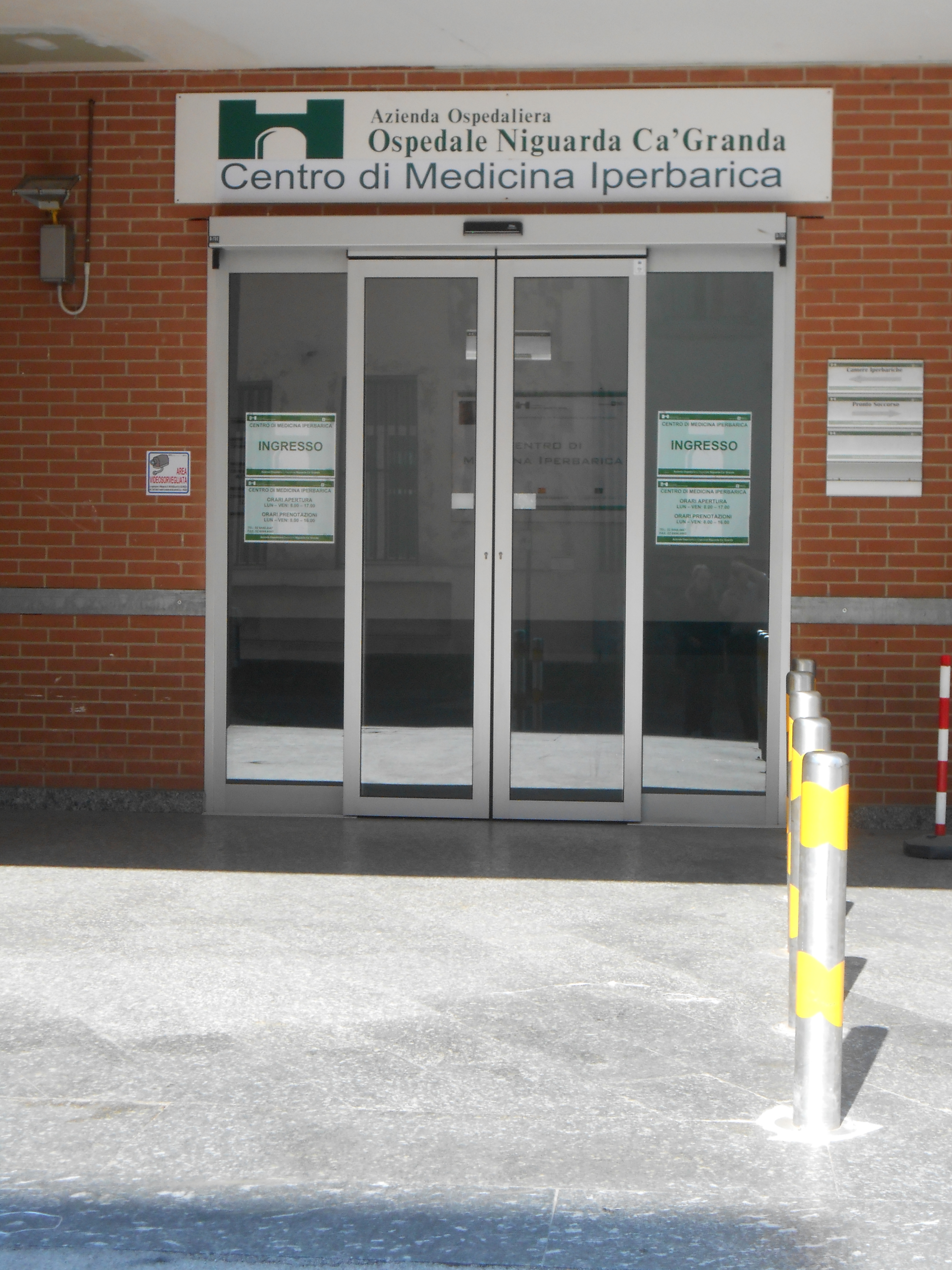 Ingresso Centro Medicina Iperbarica dell'Ospedale Niguarda